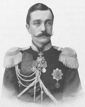 К. Дессино в чине полковника Генерального штаба. Пекин, 1900. Константин Николаевич Десино (Дессино) (4 октября 1857 — 11 февраля 1940) — русский военачальник, генерал, участник русско-турецкой войны 1877-1878, китайской кампании 1900-1901, первой мировой войны.